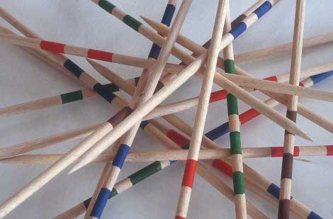 Kreuz und quer liegende Mikadostäbe